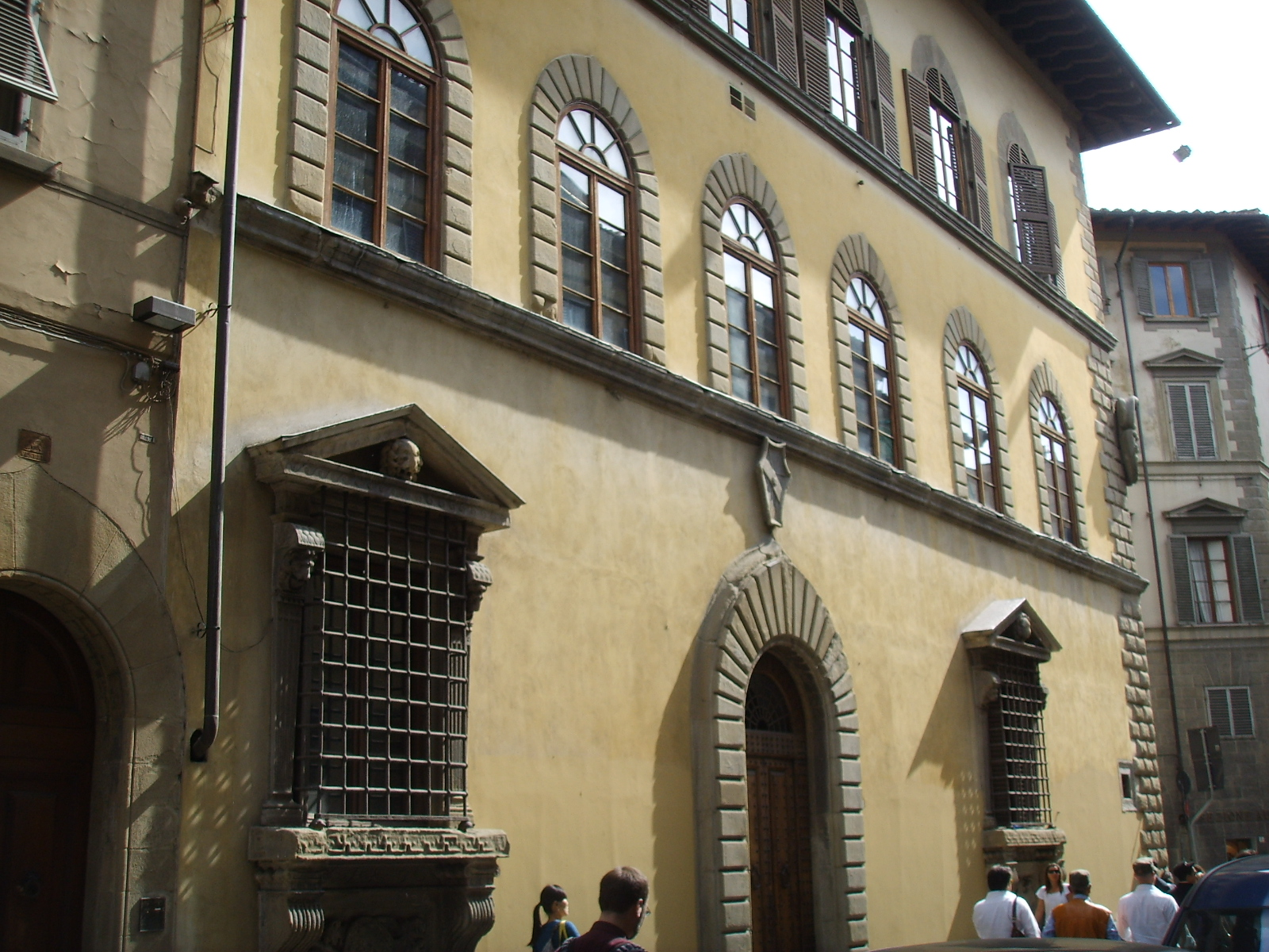 Il Palazzo di Sforza Almeni in via dei Servi a Firenze. Già palazzo Taddei, fu donato al suo coppiere (Sforza Almeni) da Cosimo I de' Medici, che lo aveva sequestrato alla famiglia antimedicea dei Taddei.